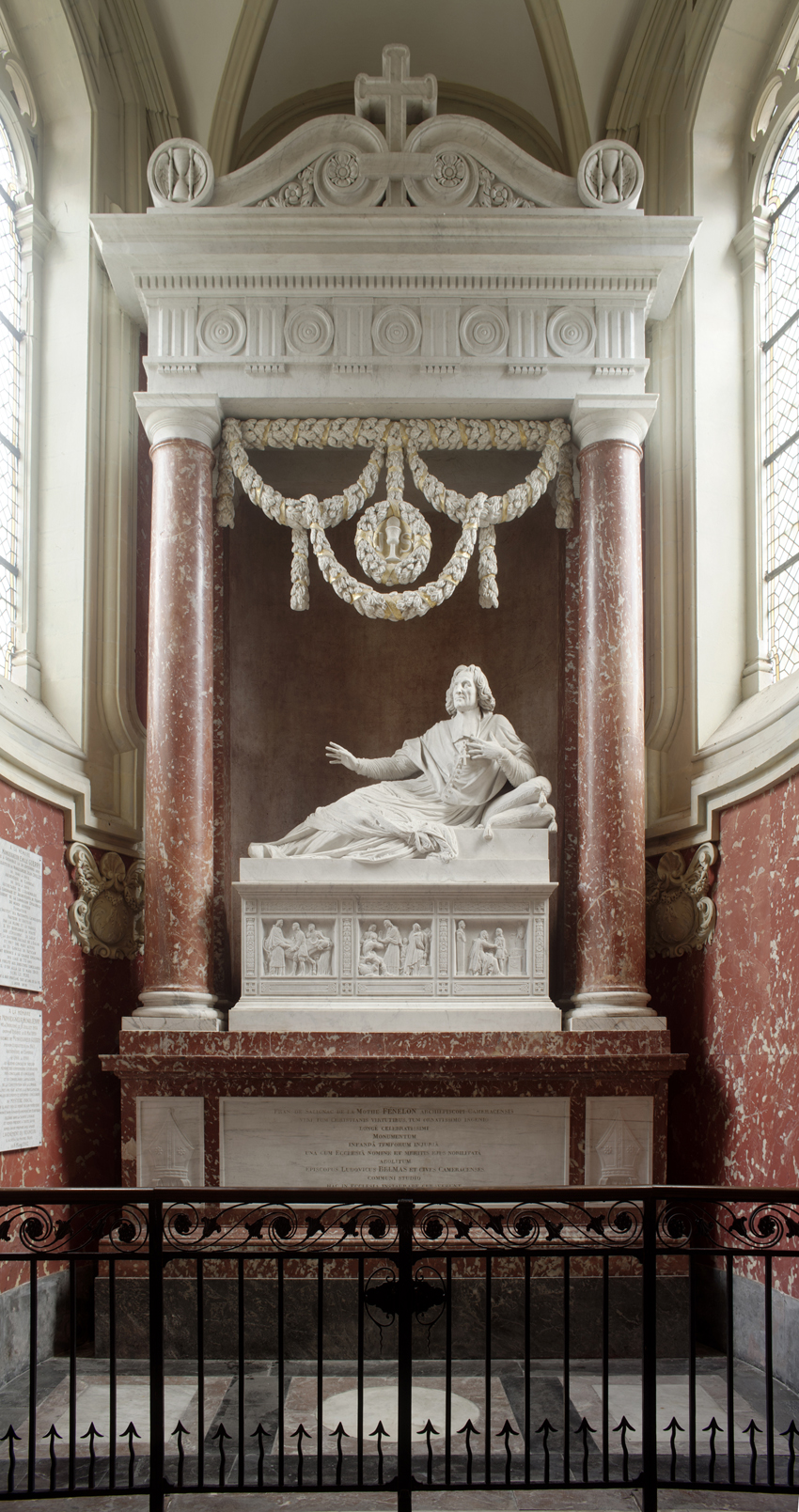 le monument funéraire à Fénelon, œuvre de David d'Angers, 1826 .